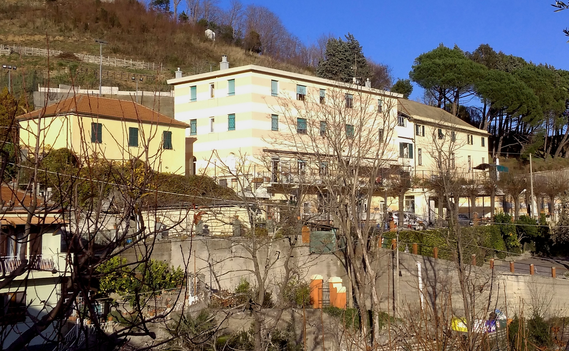 Genova, quartiere di Rivarolo, la sede del Centro di solidarietà di Trasta